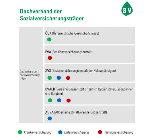 Aktuelle Übersicht über die Mitglieder und deren Aufgabengebiete